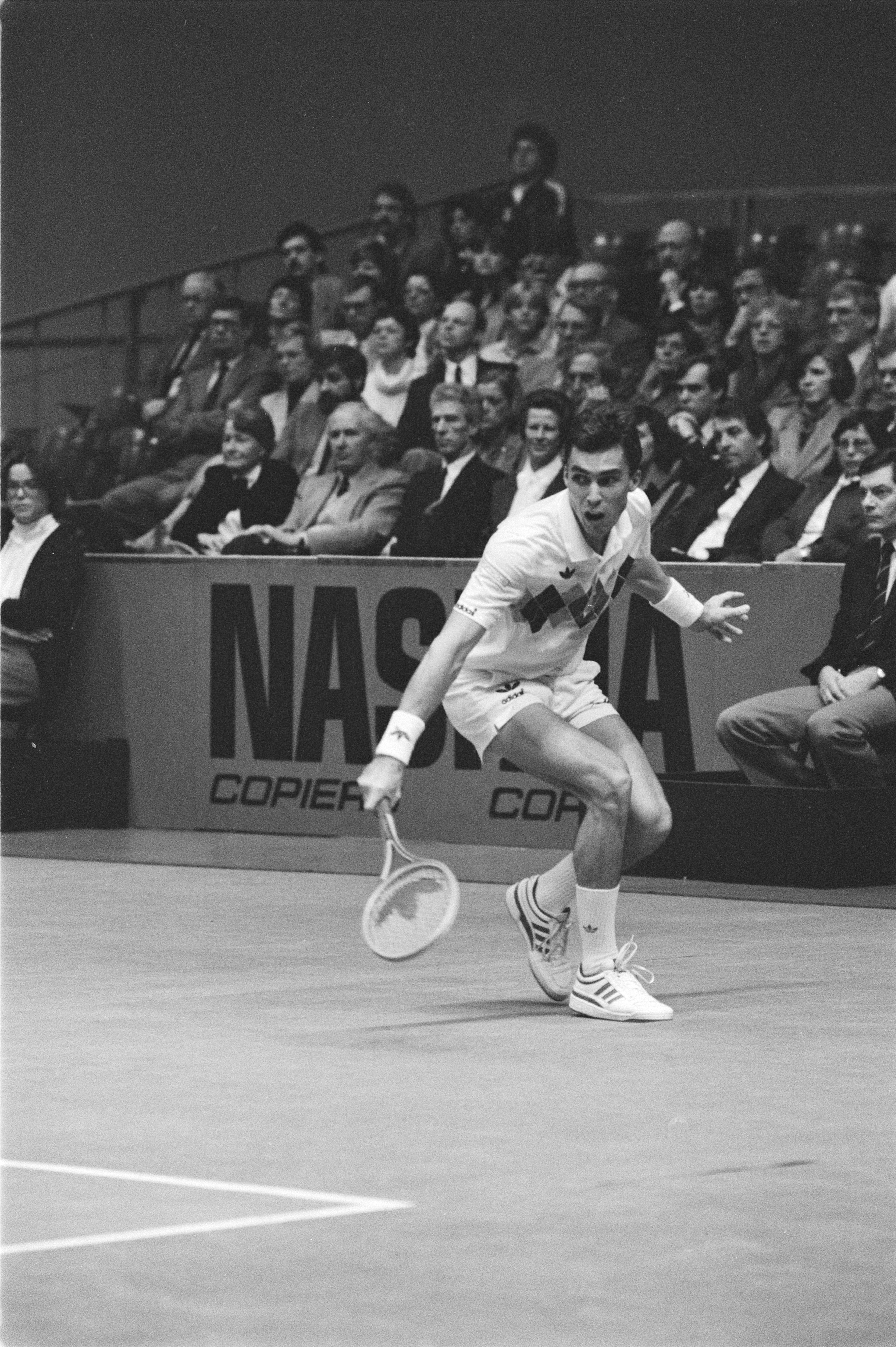 Collectie / Archief : Fotocollectie Anefo Reportage / Serie : [ onbekend ] Beschrijving : Finale ABN Tennistoernooi Rotterdam; Lendl in actie Datum : 18 maart 1984 Locatie : Rotterdam, Zuid-Holland Trefwoorden : tennis Fotograaf : Croes, Rob C. / Anefo Auteursrechthebbende : Nationaal Archief Materiaalsoort : Negatief (zwart/wit) Nummer archiefinventaris : bekijk toegang 2.24.01.05 Bestanddeelnummer : 932-9002